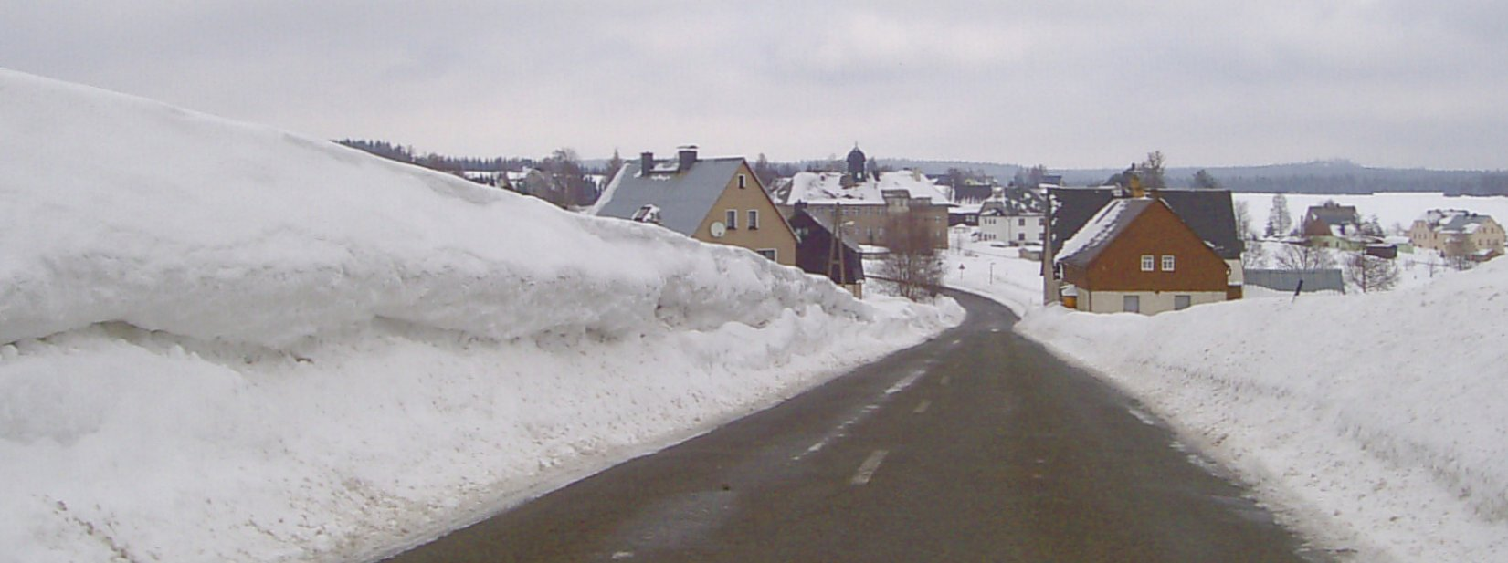 Marienberger Ortsteil Kühnhaide, südlicher Ortseingang, Erzgebirge, Deutschland